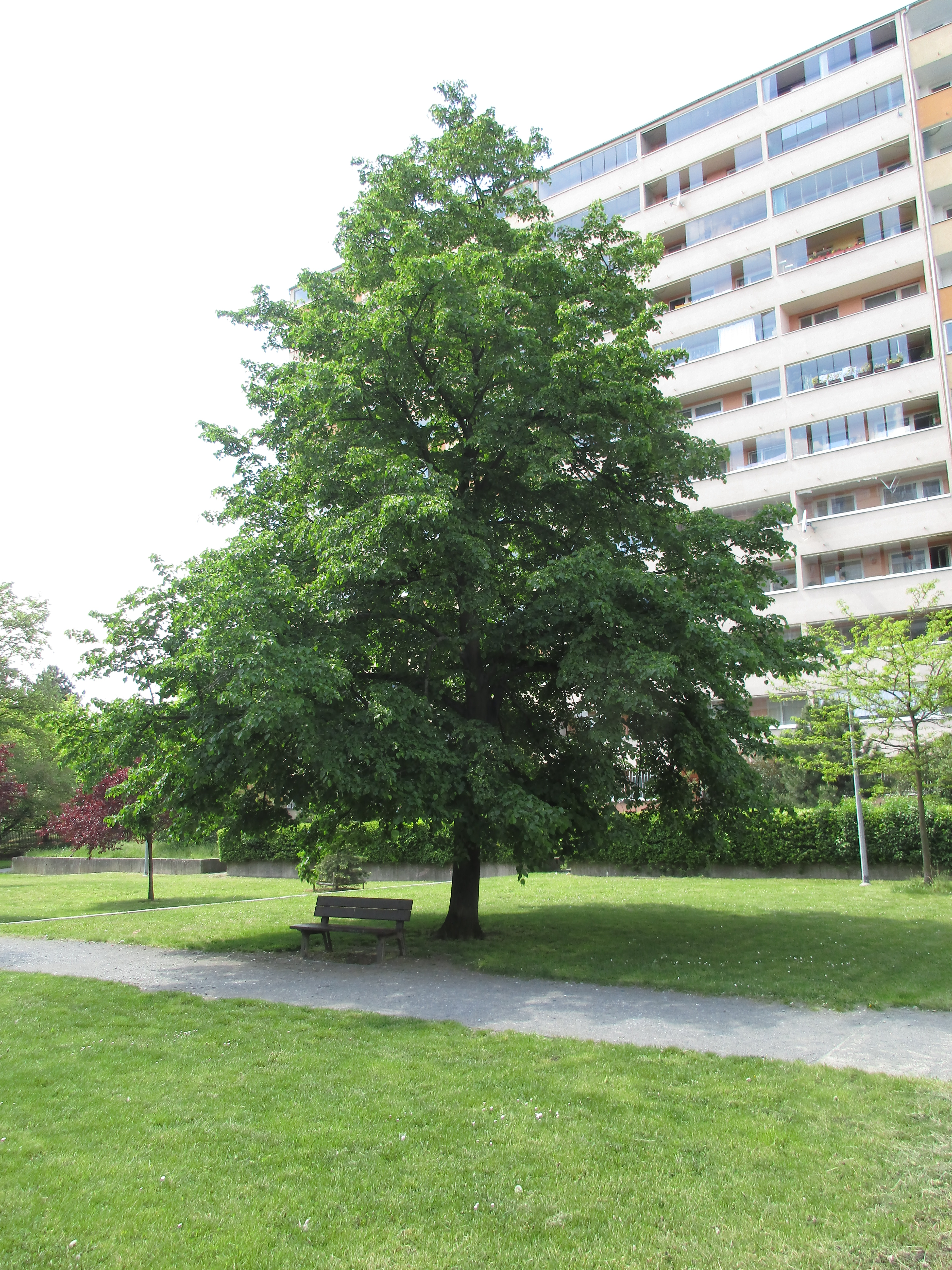 Lípa srdčitá (Tilia cordata). Praha 4 - Lhotka, Sídliště Novodvorská. Vysazena 28. října 1968 na památku 50. výročí vzniku Československé republiky. Významný strom, evidenční číslo MHMP: 38, v databázi od roku 2014.